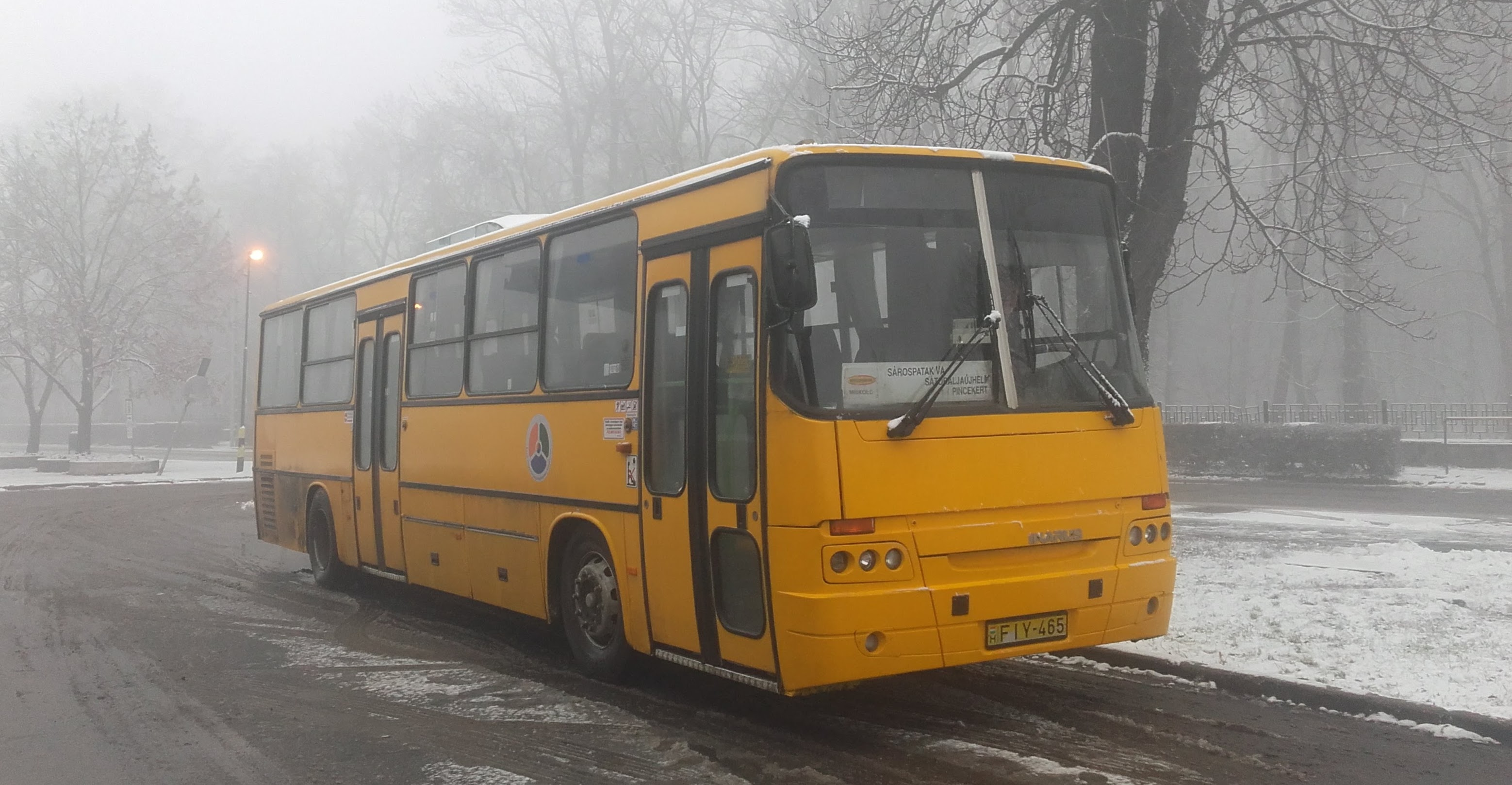 Az ÉMKK FIY-465 rendszámú Ikarus C56 típusú busza Sárospatakon, a 3870-es helyközi járaton.